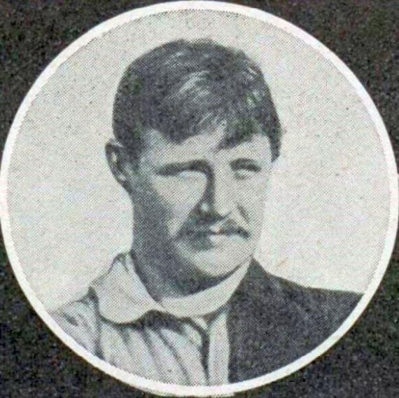 Joseph Verlet footballeur, vers 1900.